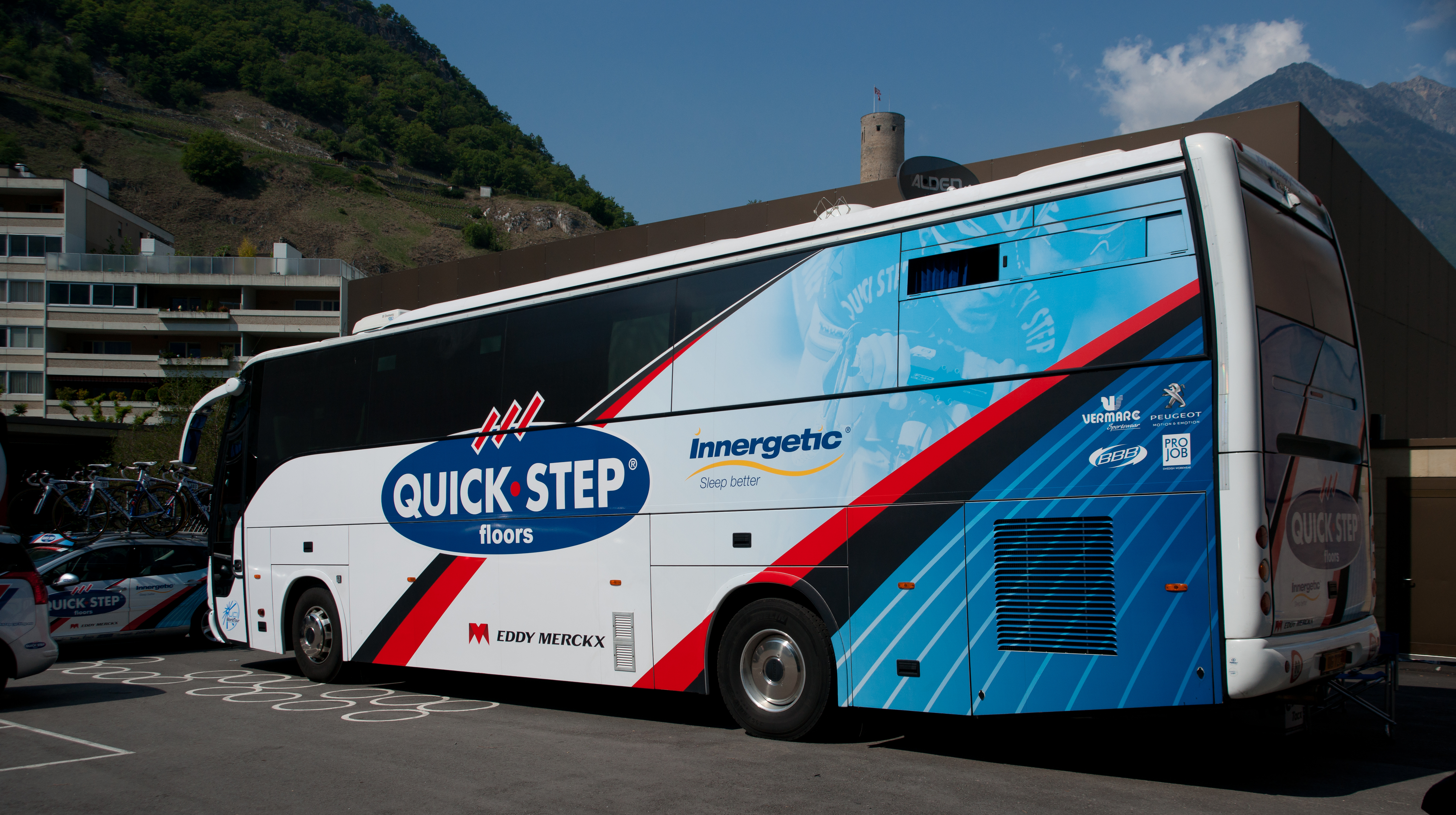 Contre la montre - Romandie 2010